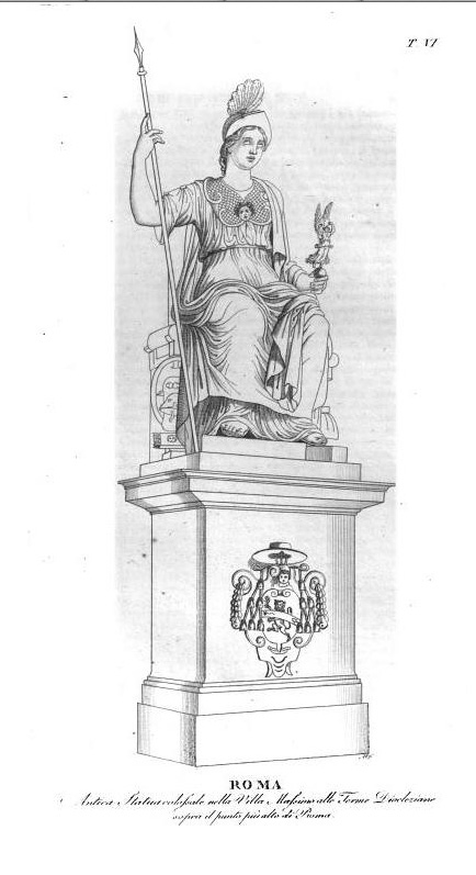 Stampa della statua detta della Giustizia sull'agger delle mura serviane a Termini. Scan dal volume di Vittorio Emanuele [Camillo IX] Massimo, Notizie istoriche della Villa Massimo alle Terme Diocleziane: con un'appendice di documenti, Roma, 1836.